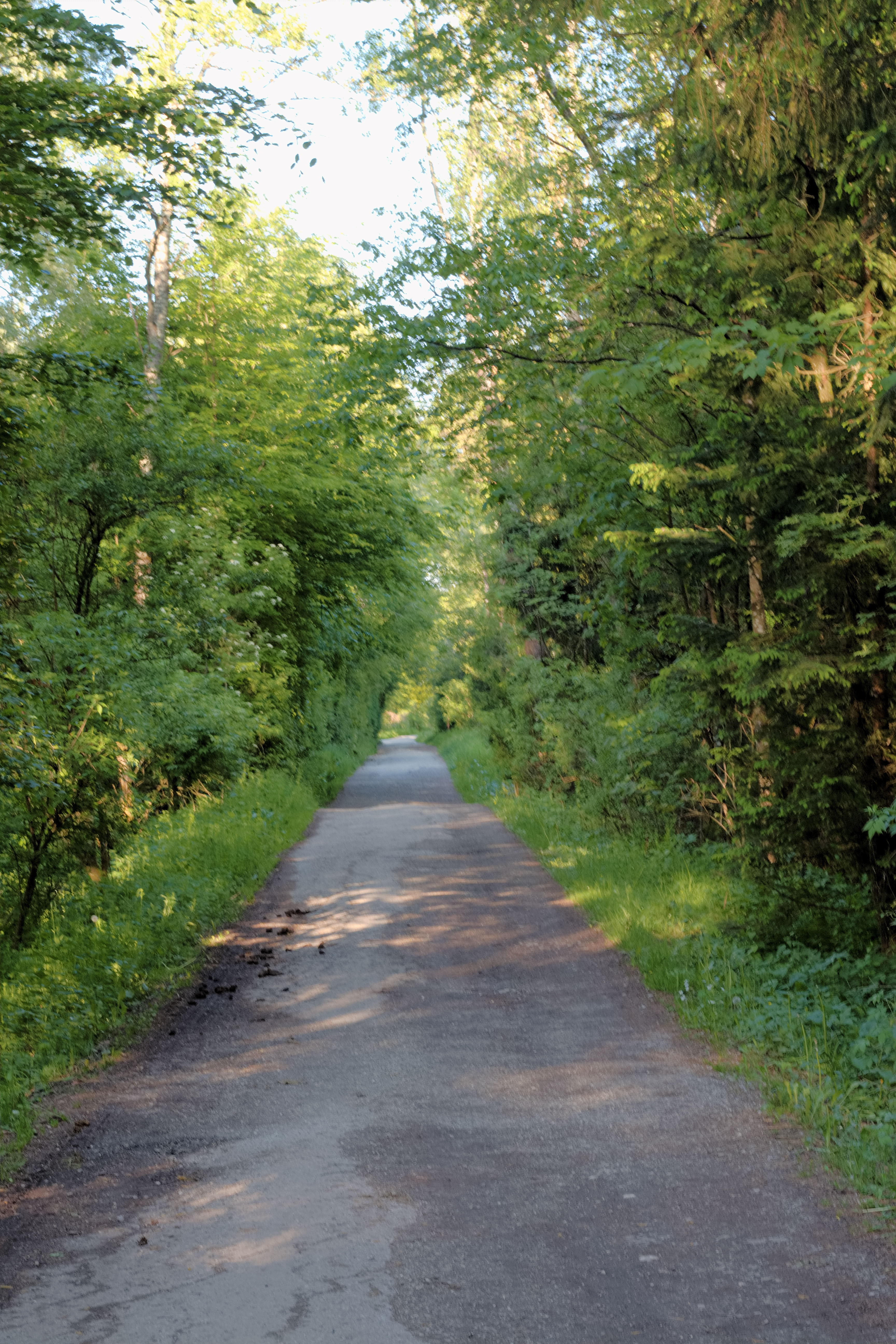 Bürmoos (Bezirk Salzburg-Umgebung): Die Grundlose Straße entstand Mitte des 19. Jahrhunderts aus einem damals neu angelegten Knüppelweg durch das Bürmooser Moor und verläuft heute durch den Naturraum der Gemeinde.